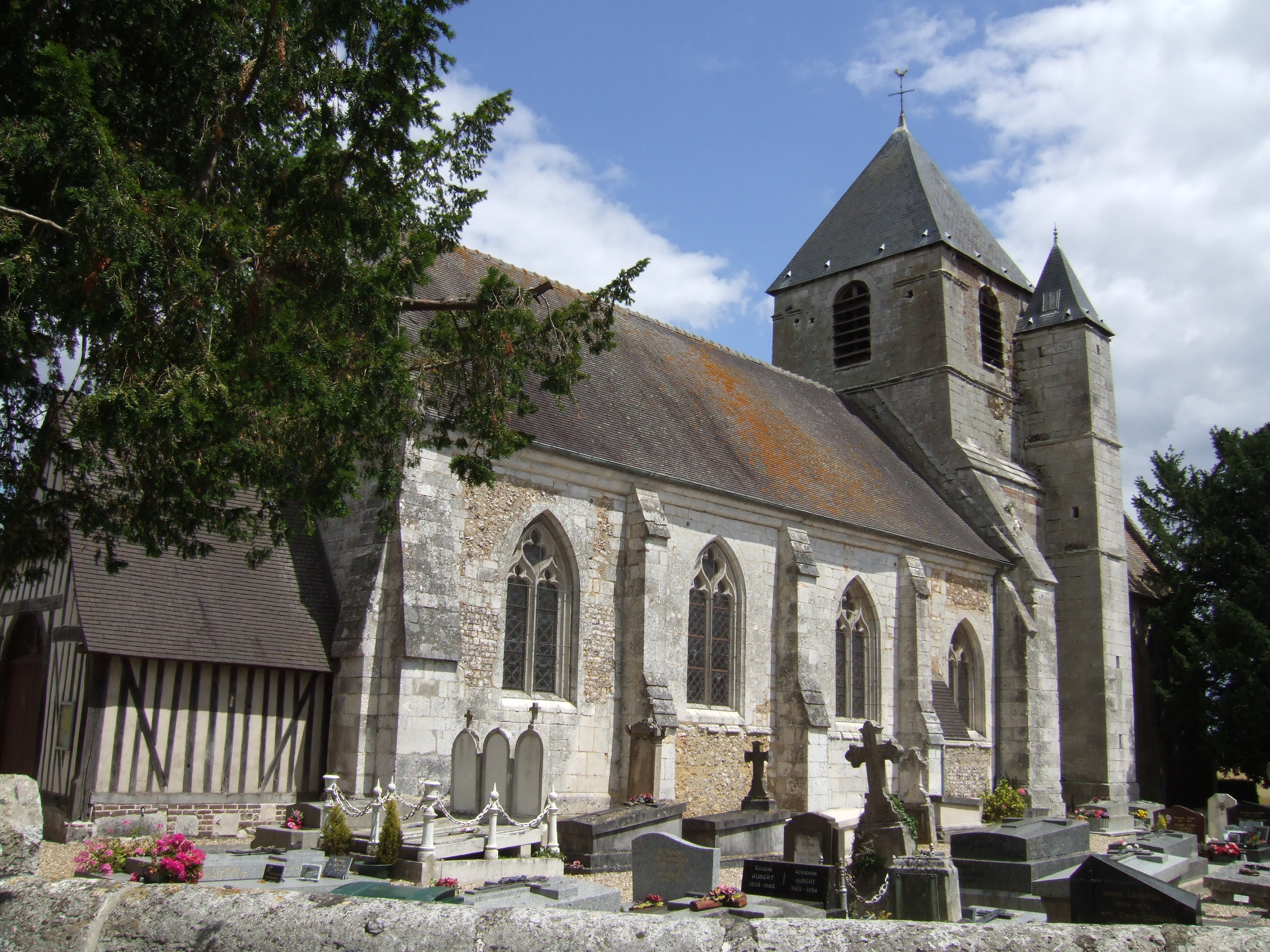 église de Bouquetot (Eure, Normandie, France)